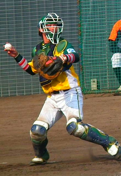 yudai hoshino